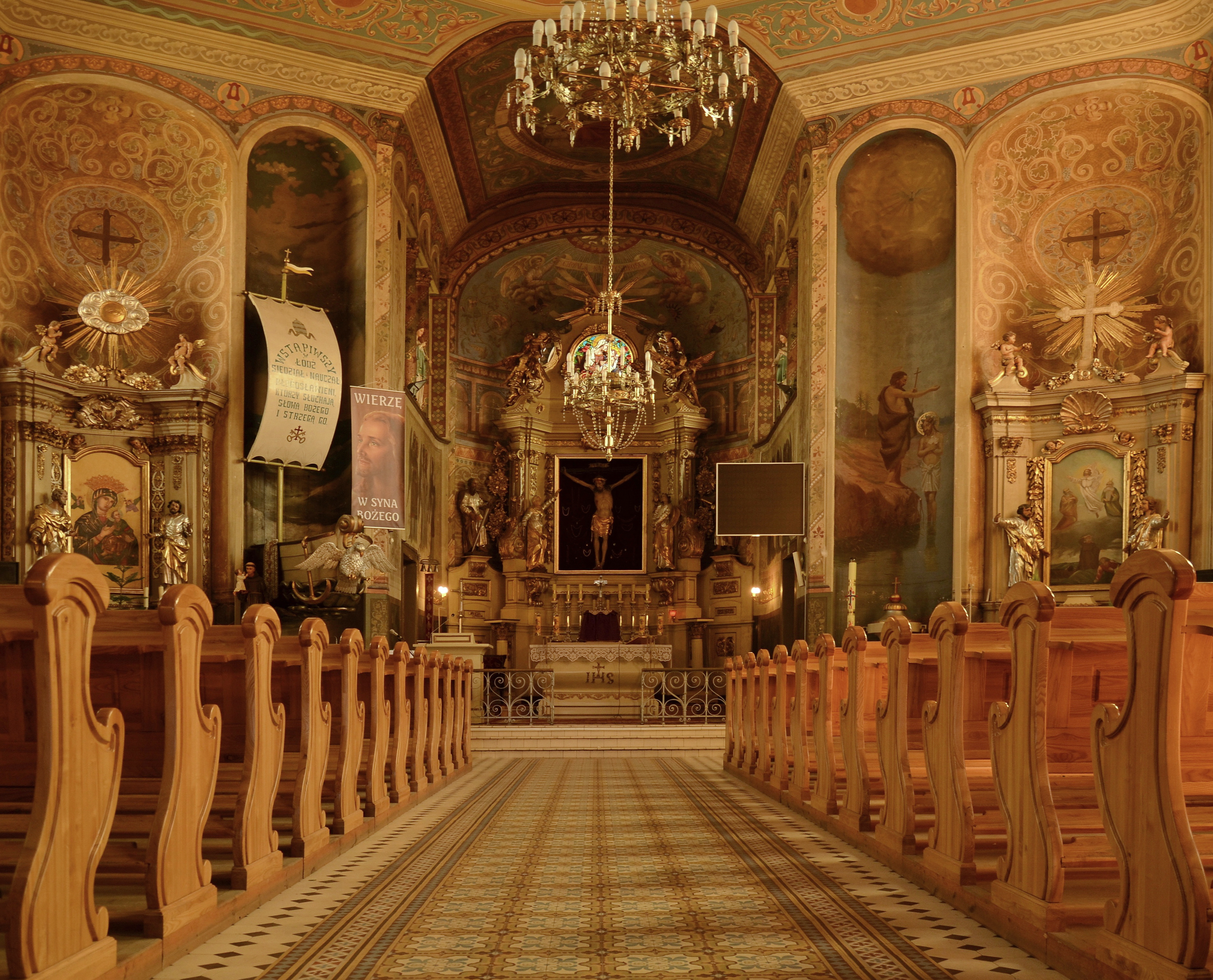 Golub-Dobrzyń, kościół par. pw. św. Katarzyny (w Dobrzyniu), 1823